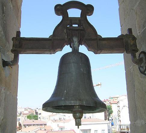 Campanillo de la Concatedral de San Pedro (Soria)